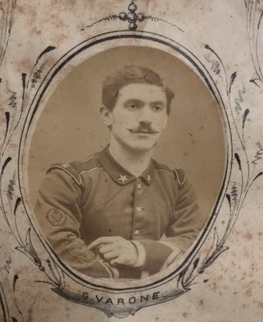 All'epoca della Scuola Magistrale di Scherma di Milano nel 1880